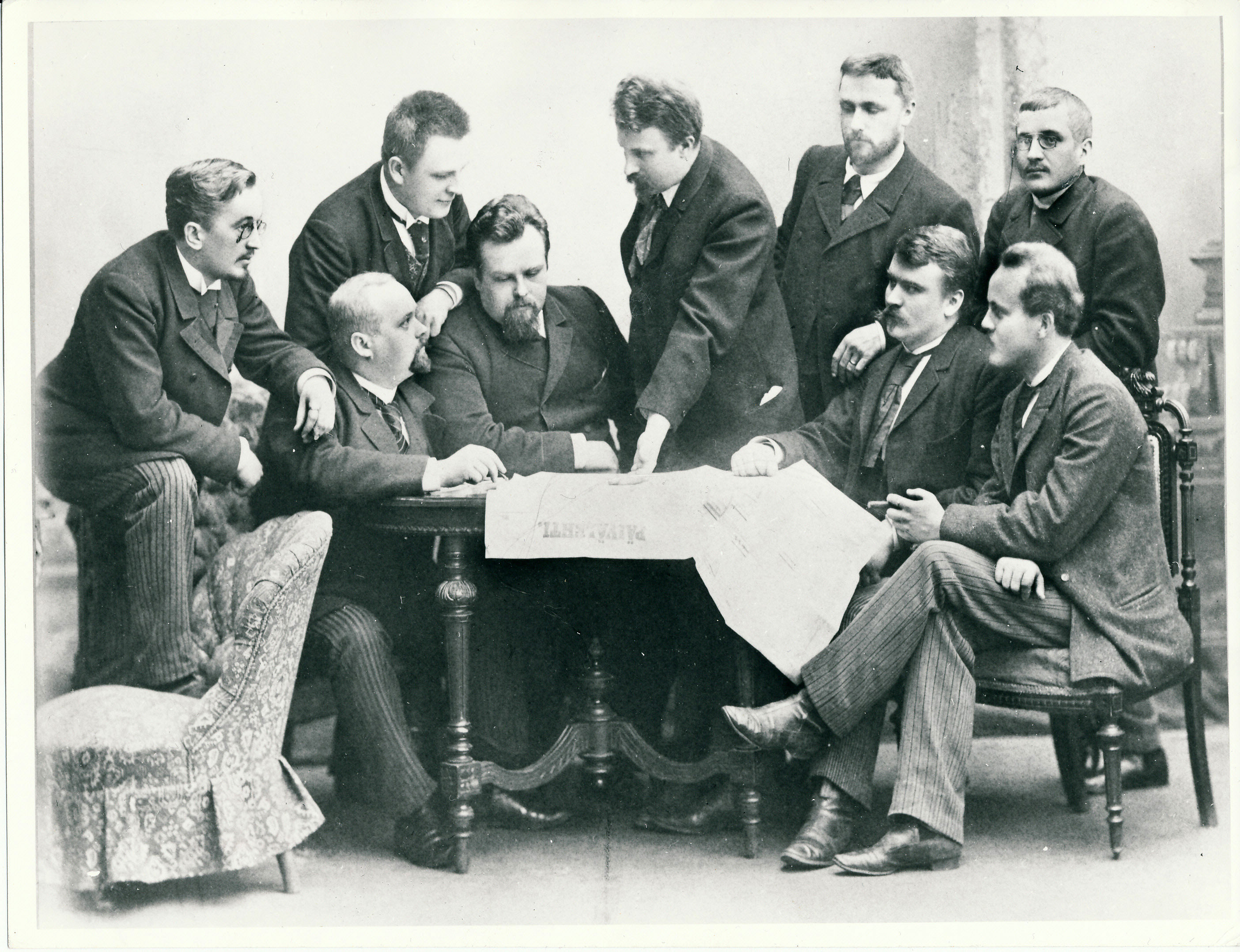 Päivälehden toimitus v. 1893: Seisomassa vasemmalta Kasimir Leino, Reinhold Roine, Juhani Aho, Arvid Järnefelt ja Erkki Reijonen. Pöydän ääressä istumassa vasemmalta Santeri Ingman, E.O. Sjöberg, Eero Erkko sekä Filip Waren.